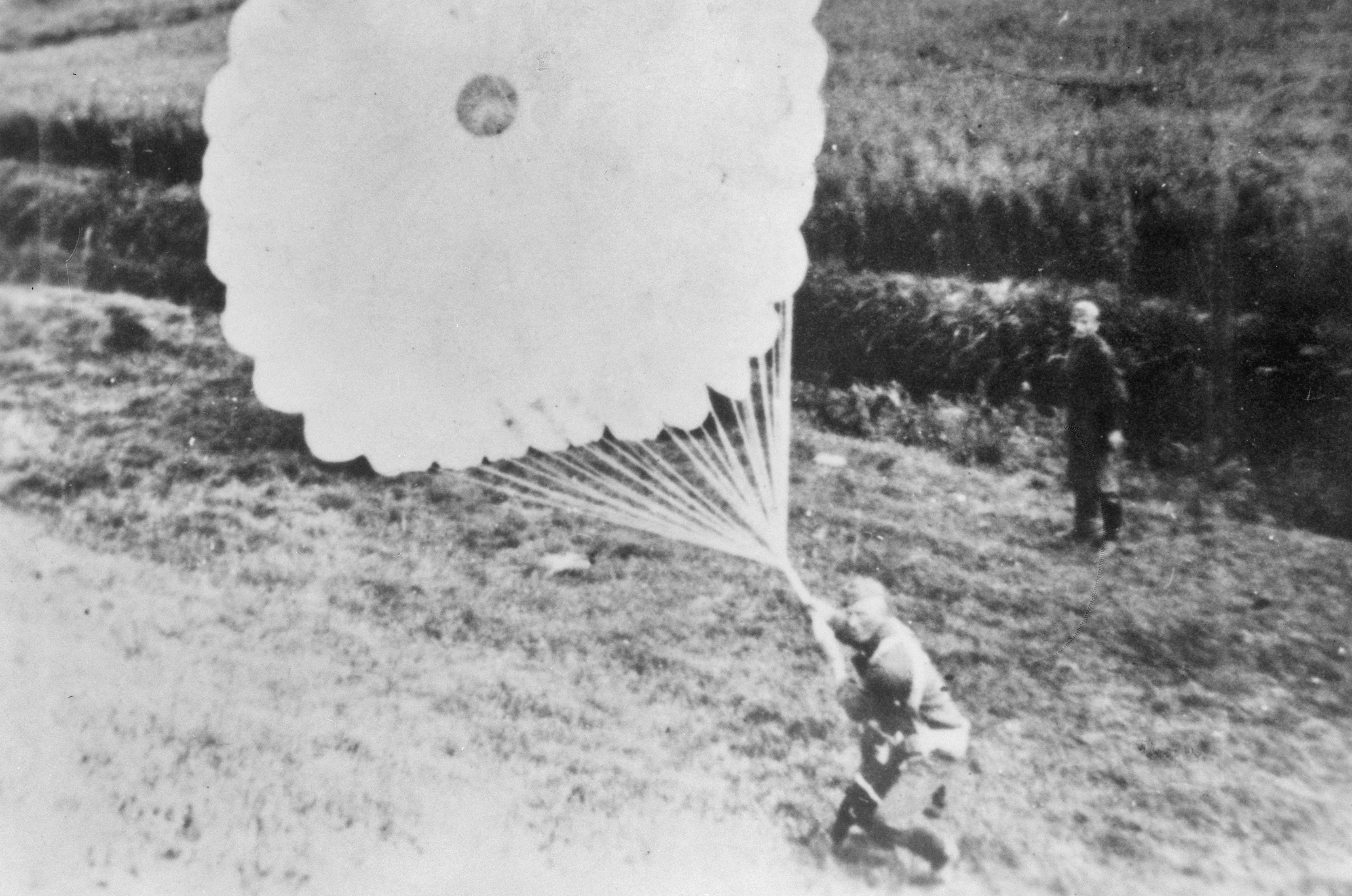 Duitse parachutisten landen in Nederland op 10 mei 1940